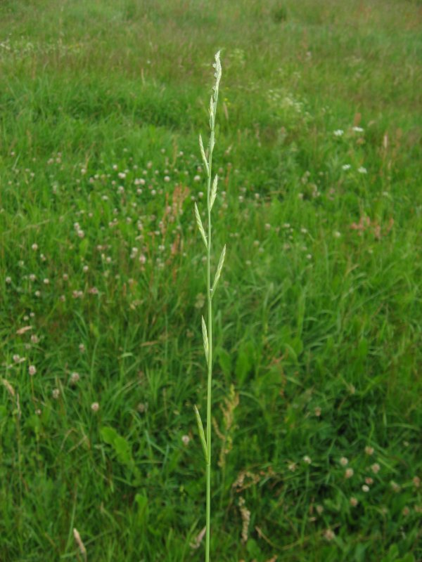 Welsches Weidelgras (Lolium multiflorum), Gragetopshof